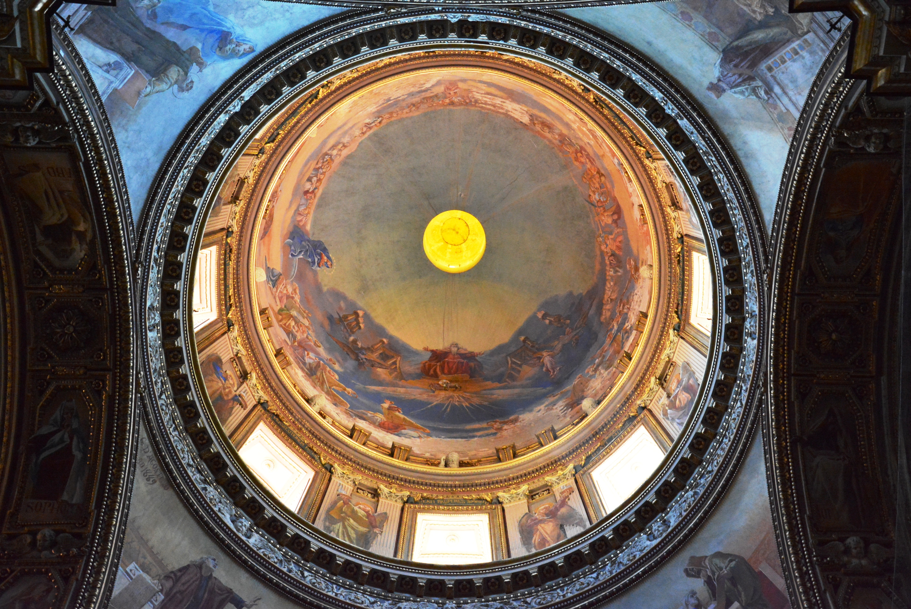 Cattedrale di Maria Santissima Assunta a Castellamma di Stabia